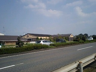 川越はつかり温泉